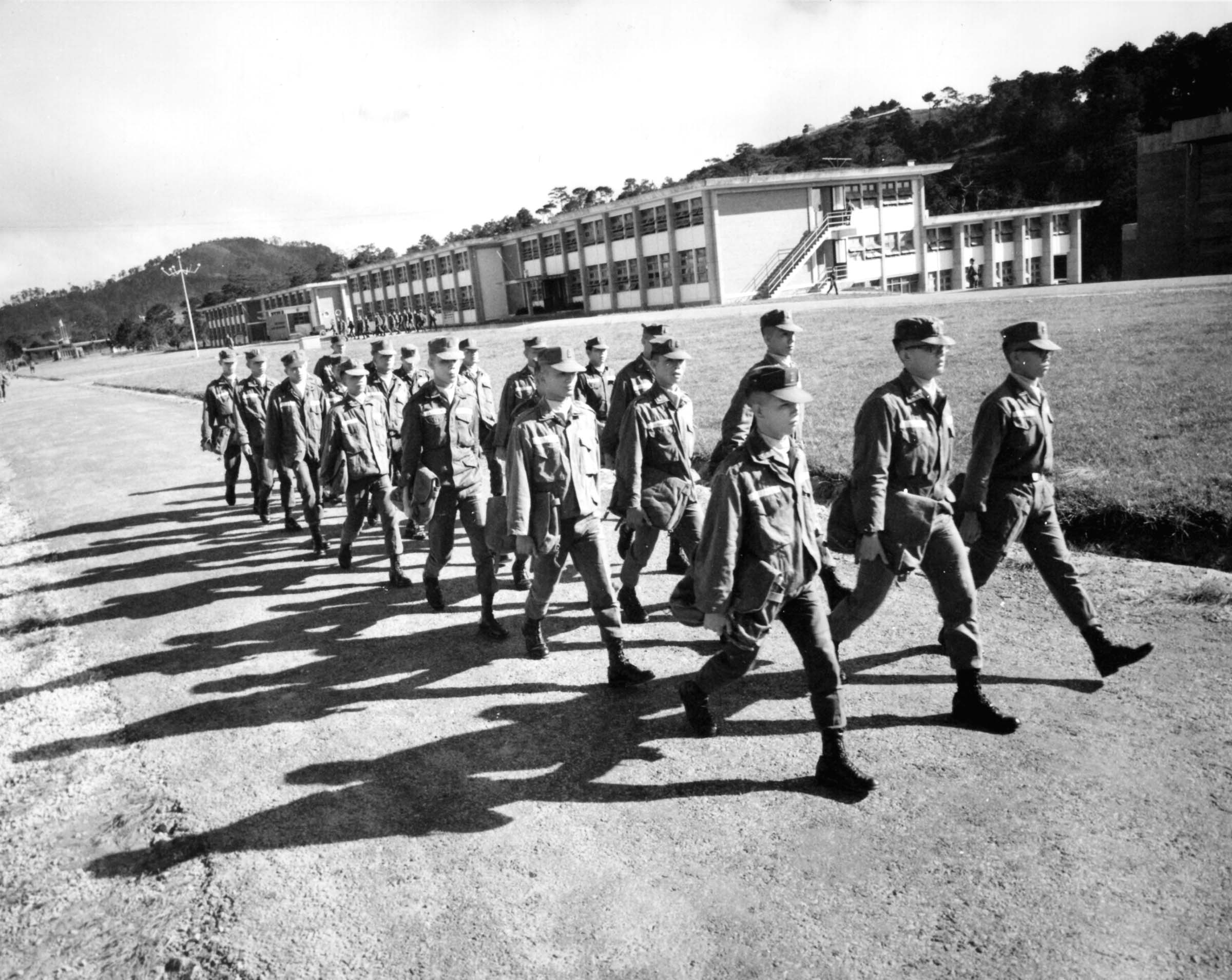 Cadets At Dalat